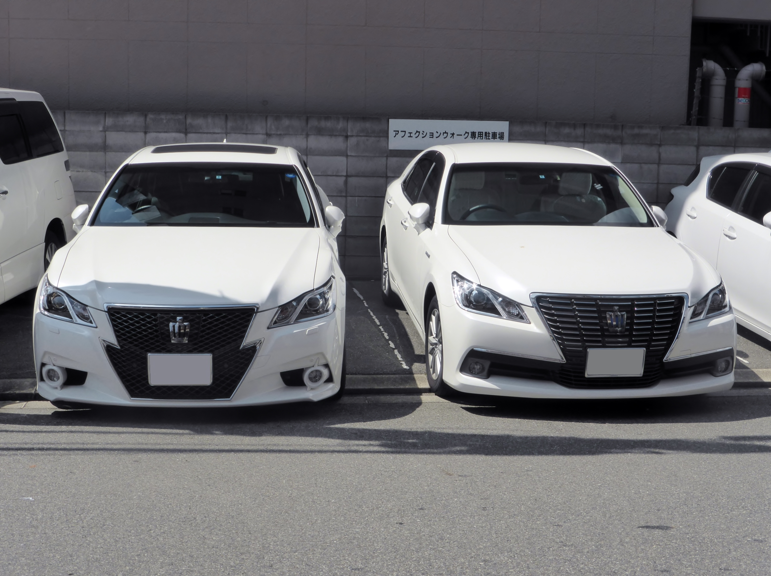 S210型トヨタ・クラウンのアスリート及びハイブリッドロイヤルサルーンをそれぞれフロントから撮影。